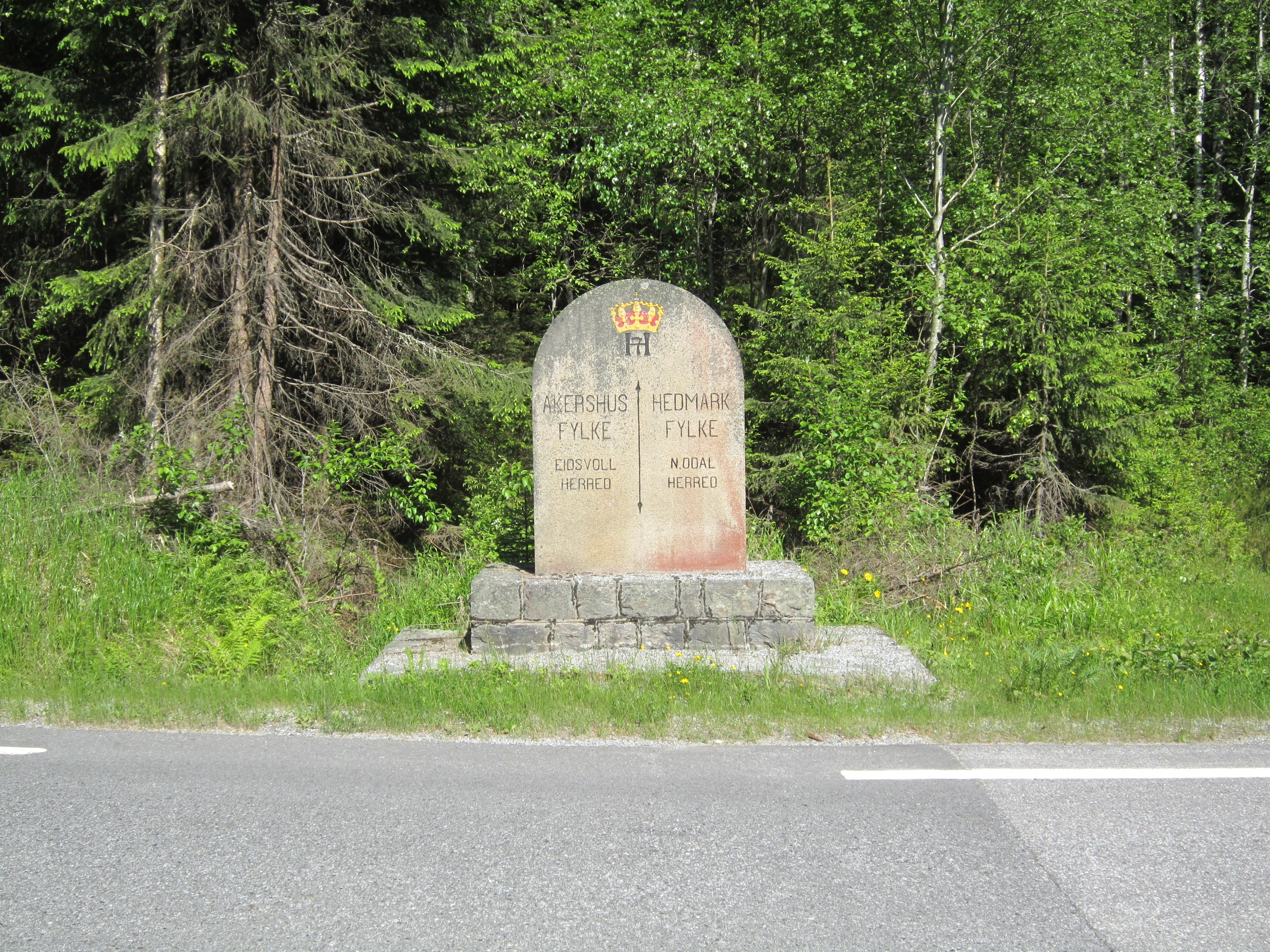 Fylkesvei 181 går mellom Eidsvoll og Nord-Odal, og denne steinen markerer kommune- og fylkesgrensen.